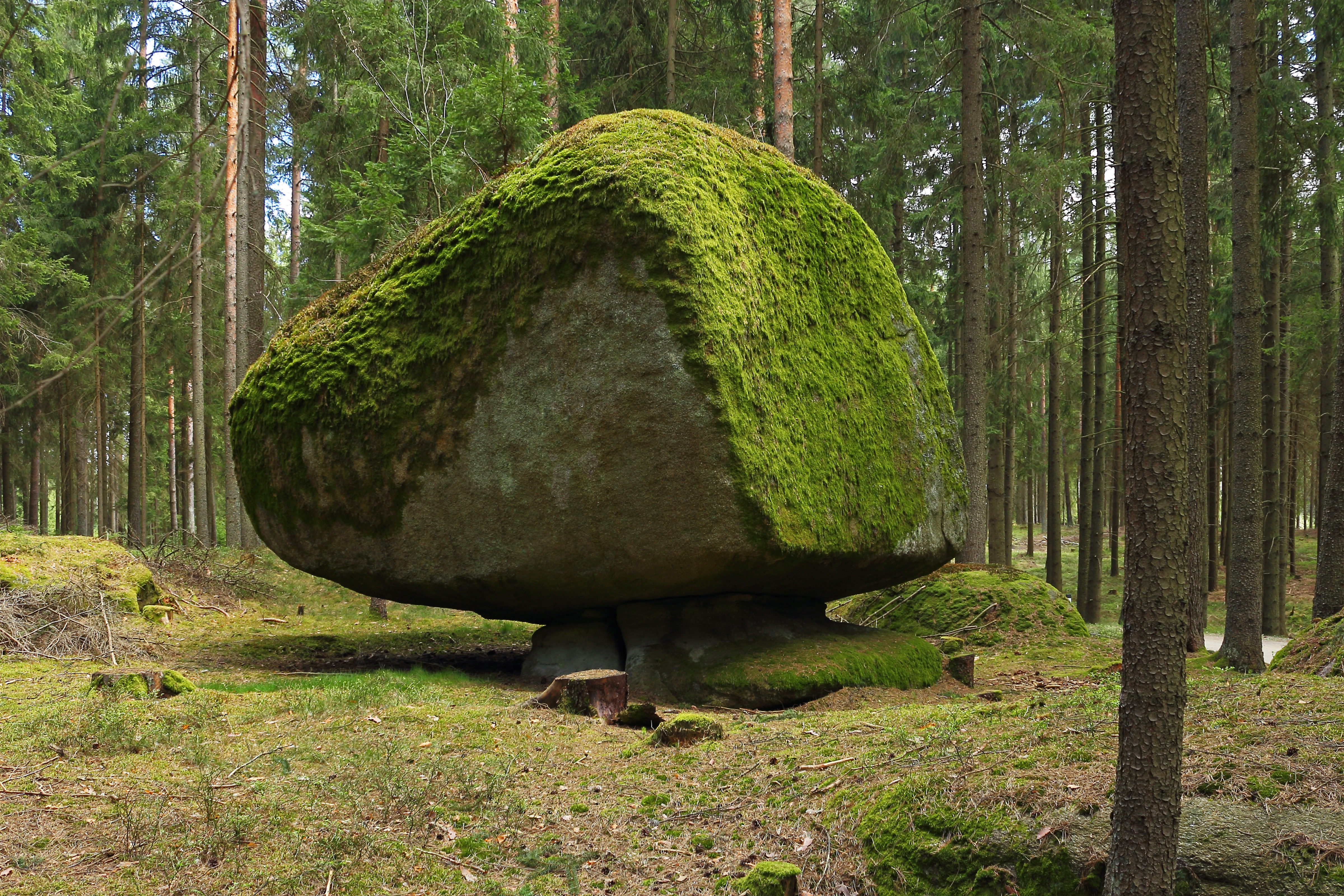 Das Felsgebilde "Striezel und Scherzel" bei Kiensaß wurde 1988 zum Naturdenkmal erklärt. This media shows the natural monument in Lower Austria with the ID GD-102.